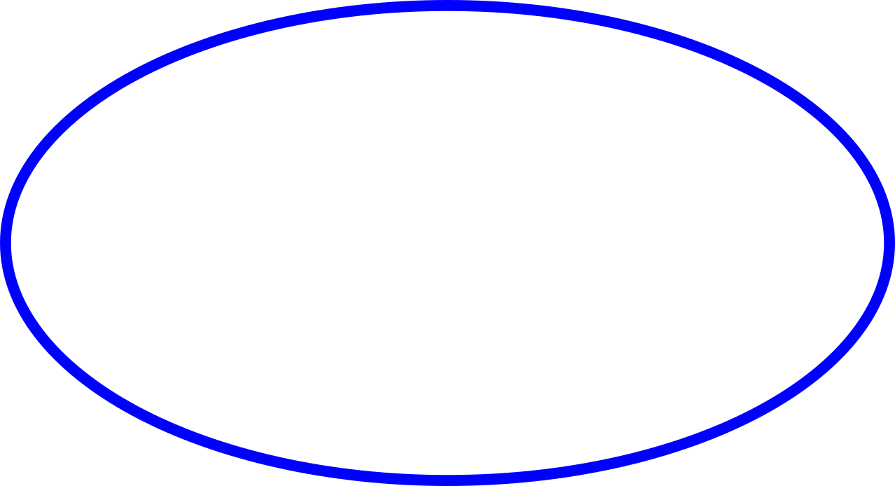 אליפסה